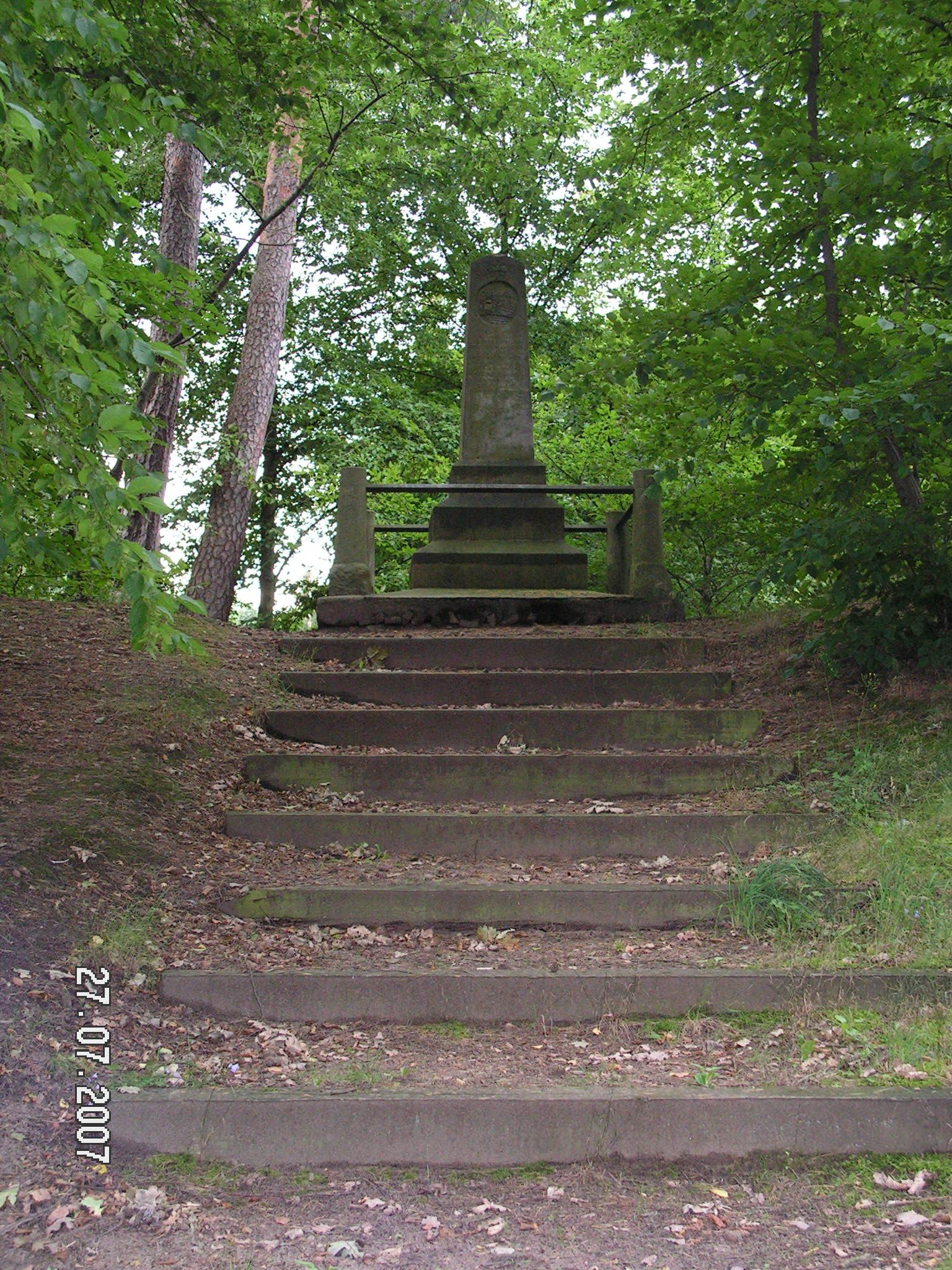 Lübeck/Gedenkstein für den preußischen Major Friedrich Wilhelm Ludwig von Arnim-Suckow, gefallen 1813